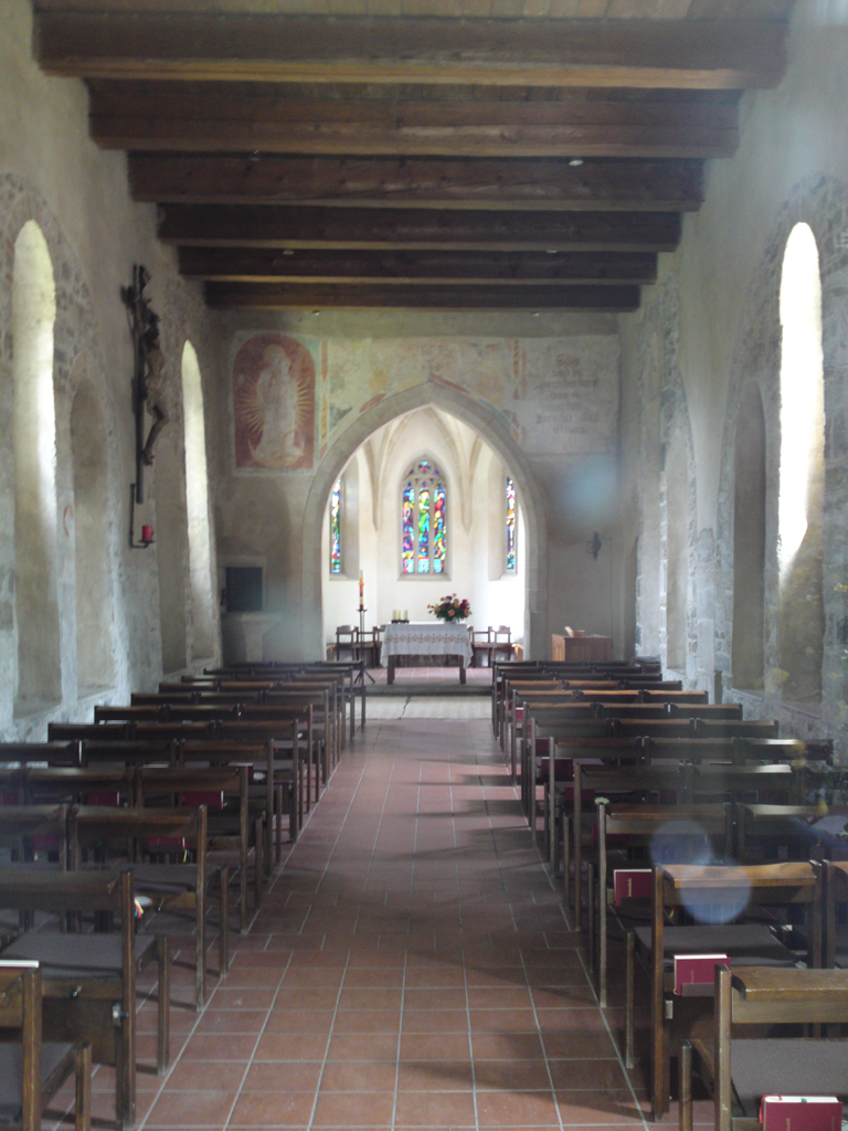 Innenraum der seit dem Frühmittelalter bestehenden Martinskirche in Linz/OÖ, hier wurden u.a. auch römische Spolien verbaut.